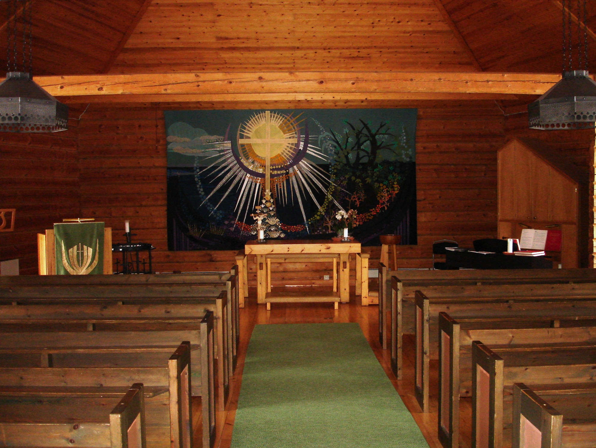 Credo Fjällgårds Kyrka interiör